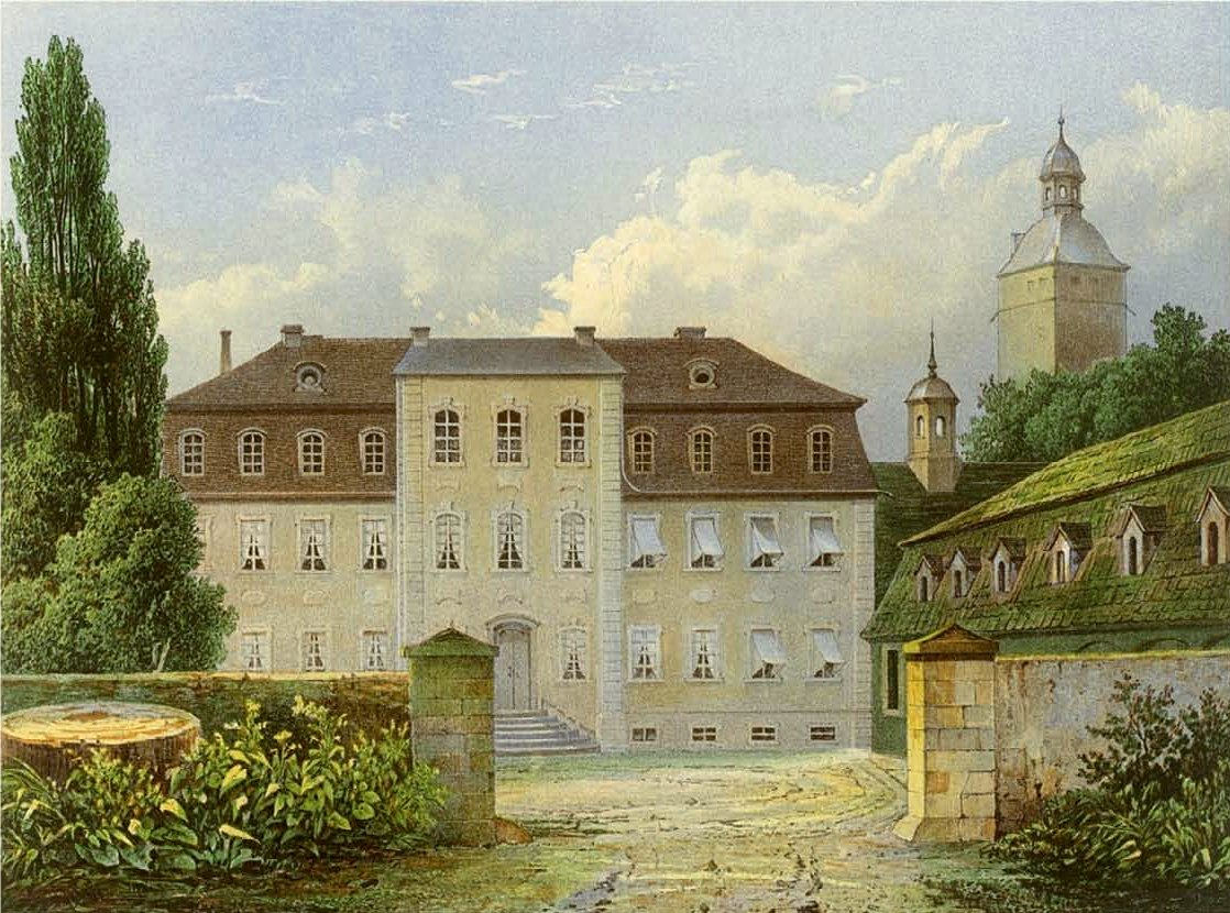 Schloss Erxleben, Kreis Neuhaldensleben, Provinz Sachsen